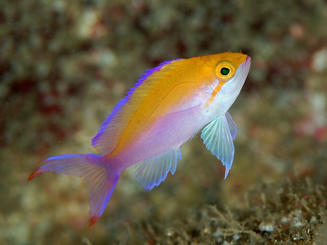 フタイロハナゴイyg Pseudanthias bicolor